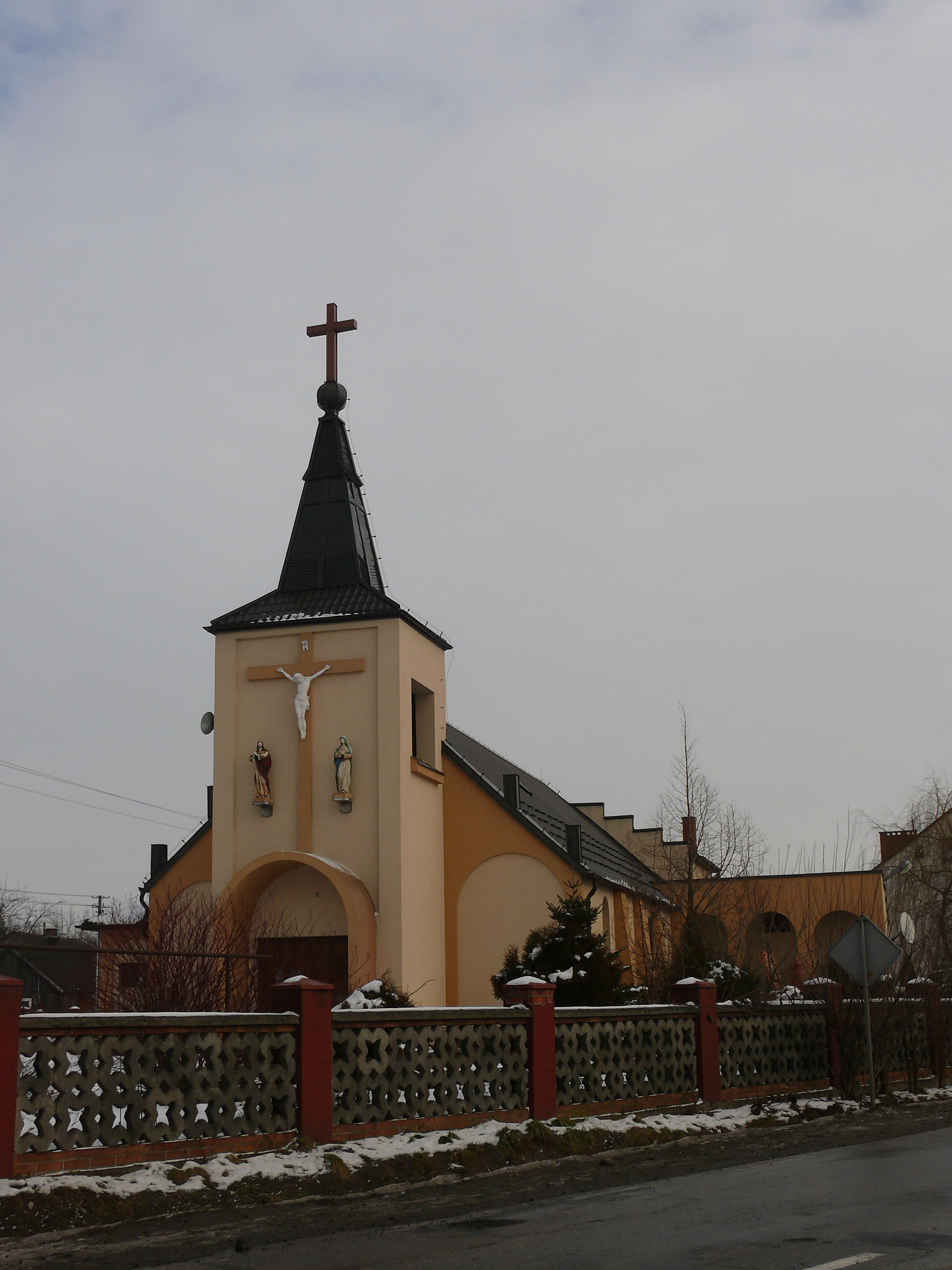 Kościół w Janikowie p.w. św. Maksymiliana Kolbego